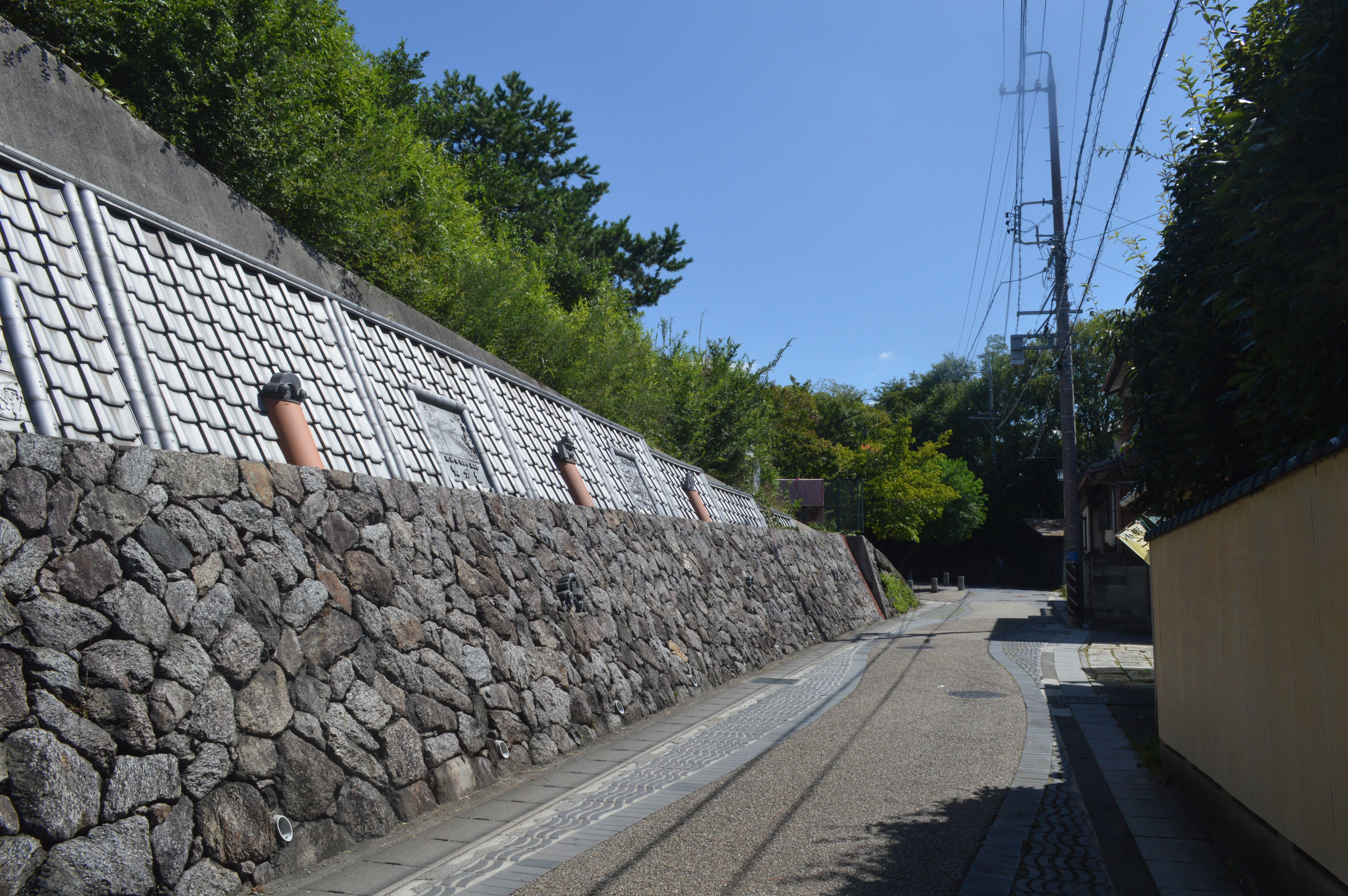 愛知県高浜市の三州高浜鬼みち。三州瓦が用いられている。